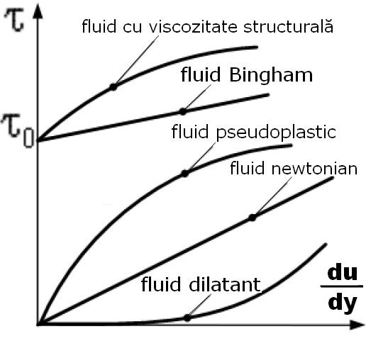 Tensiunea tangentială în funcţie de gradientul vitezei